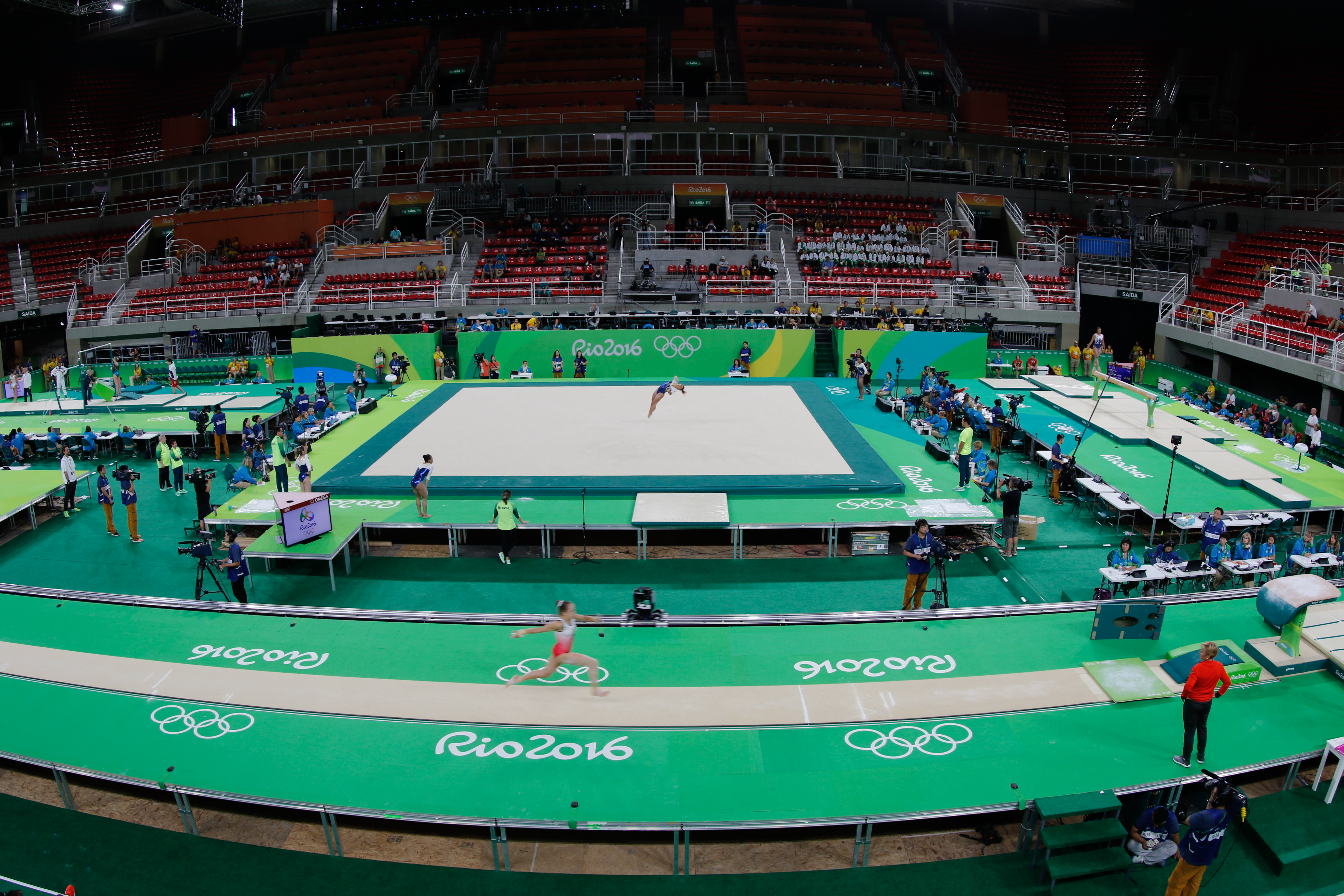 Rio de Janeiro - Treino da seleção feminina de ginástica artística do Brasil na Arena Olímpica dos Jogos Rio 2016 (Fernando Frazão/Agência Brasil)